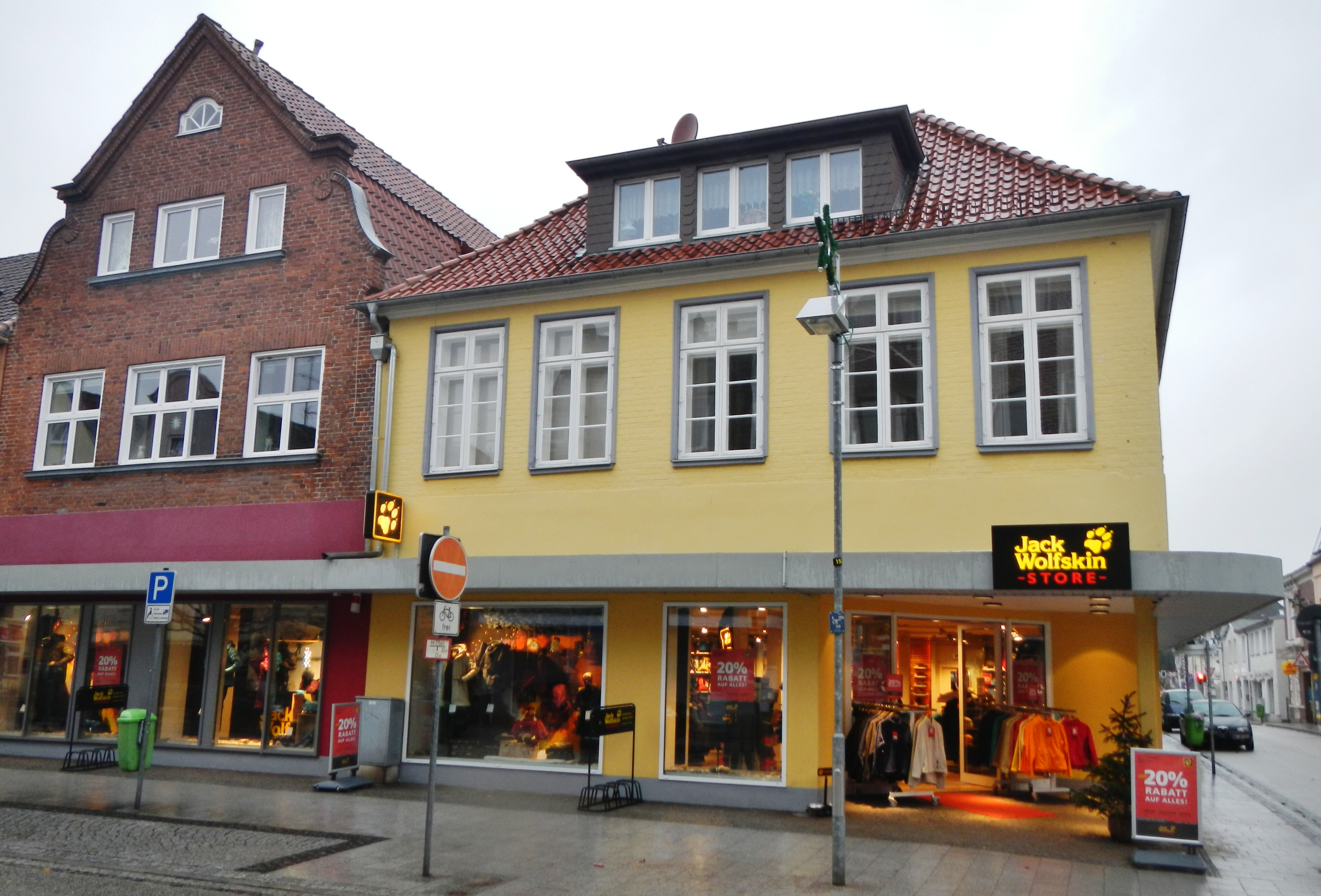 Jack Wolfskin in Travemünde in der Kurgartenstraße